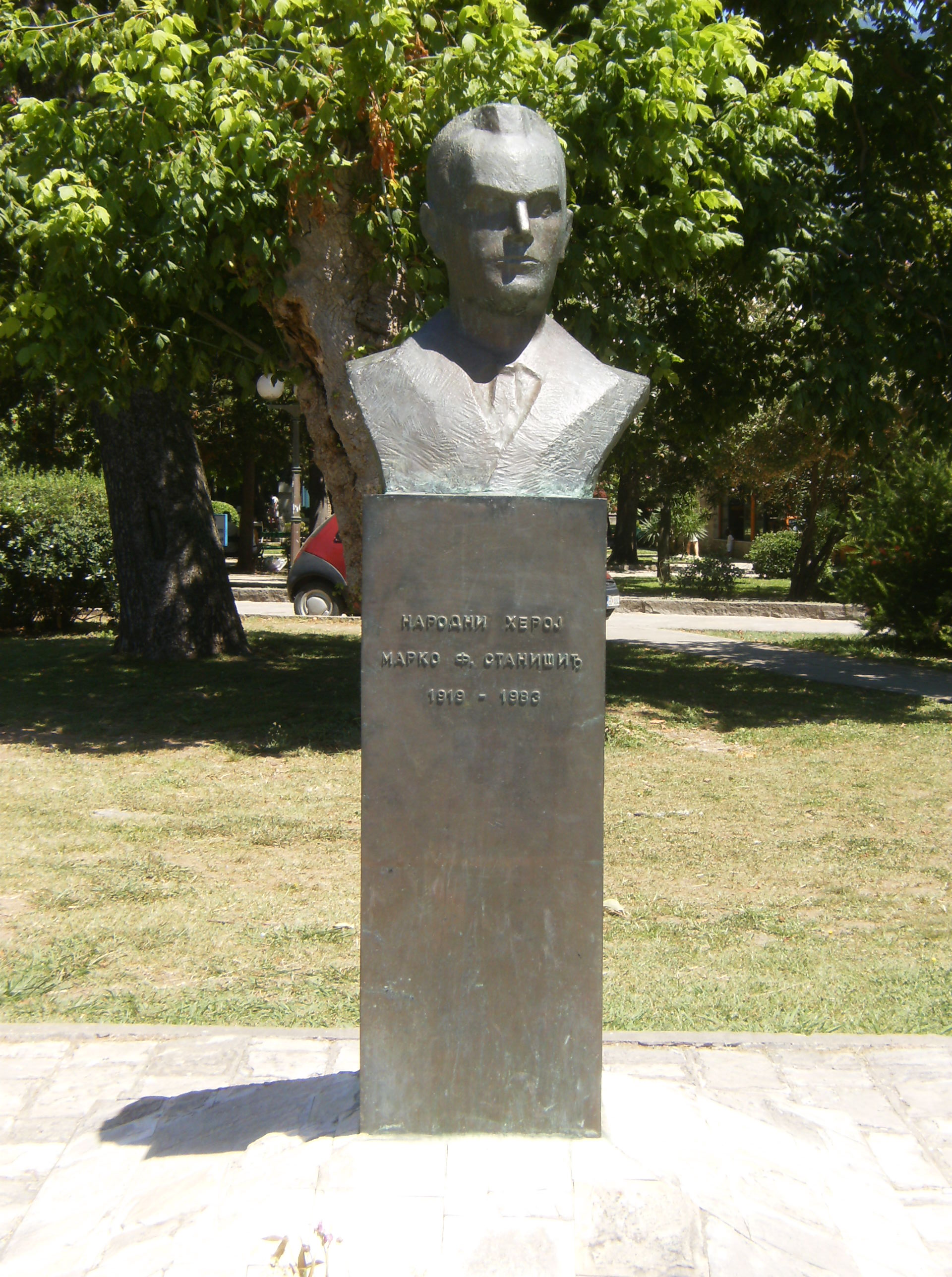 пам'ятник Стефану Станишичу у м. Будва